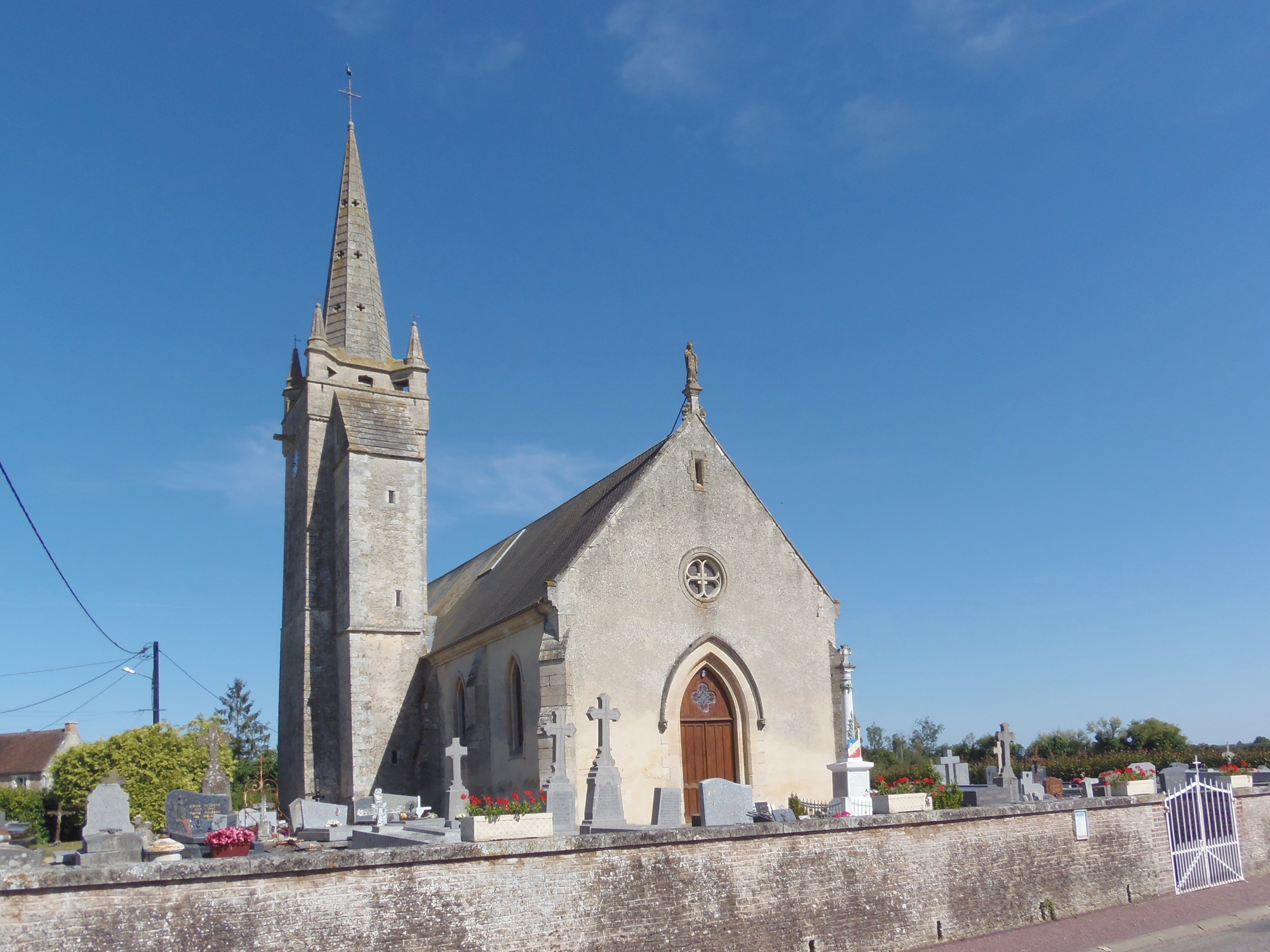 Louvières-en-Auge (Normandie, France). L'église Saint-Pierre.